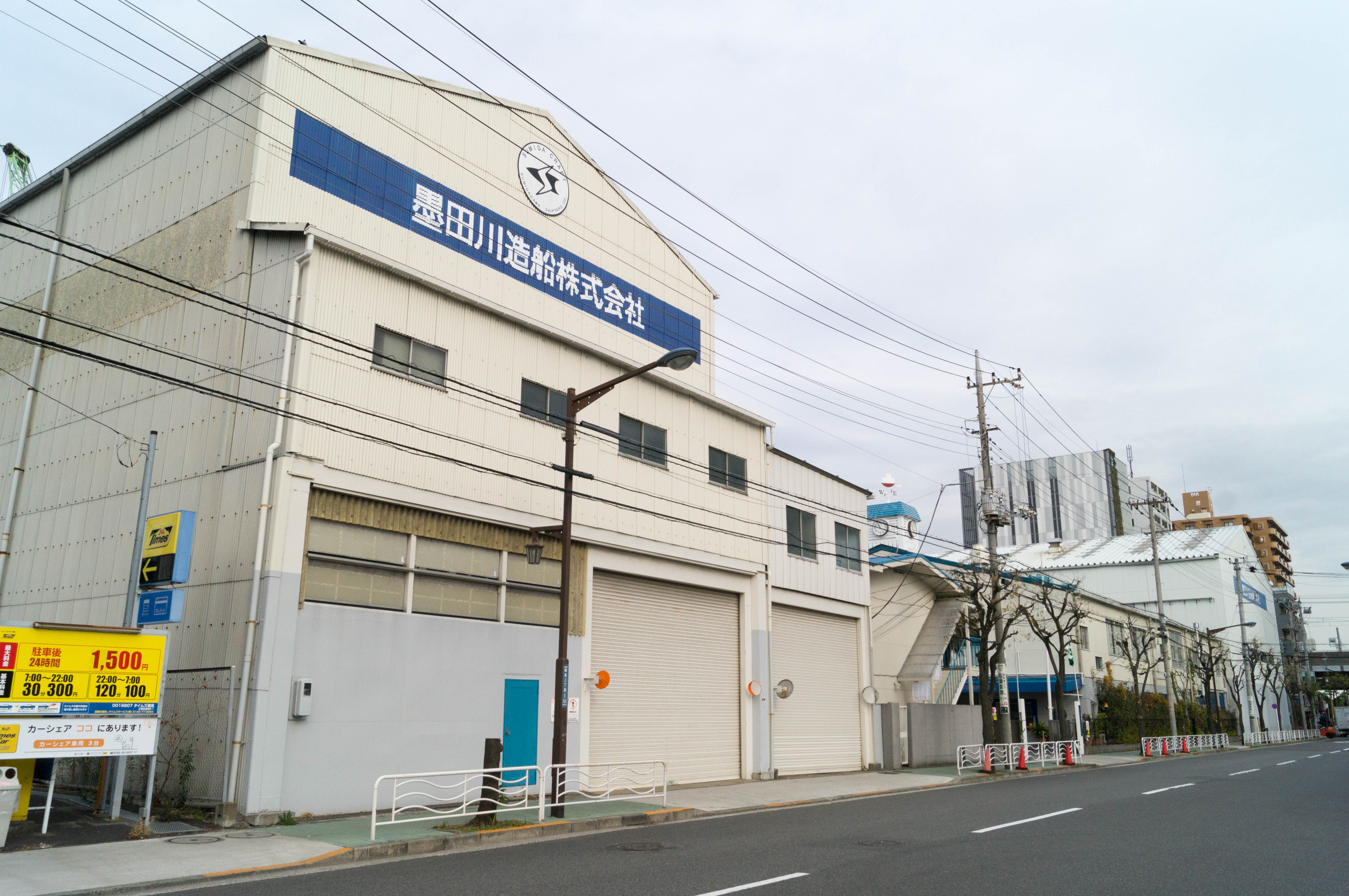 東京都江東区潮見の隅田川造船本社工場。（2016年12月29日撮影）